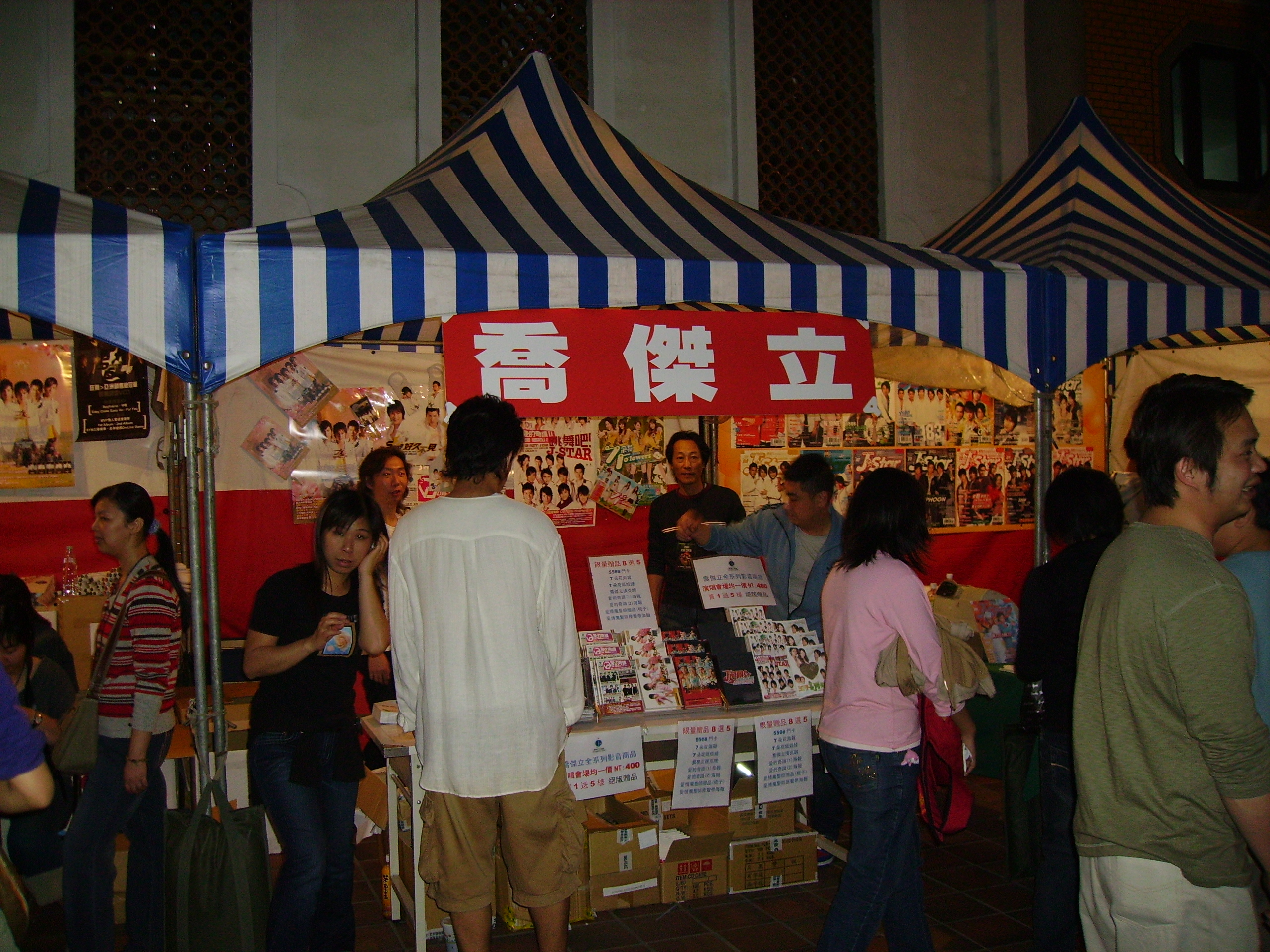 喬傑立娛樂的造勢活動。